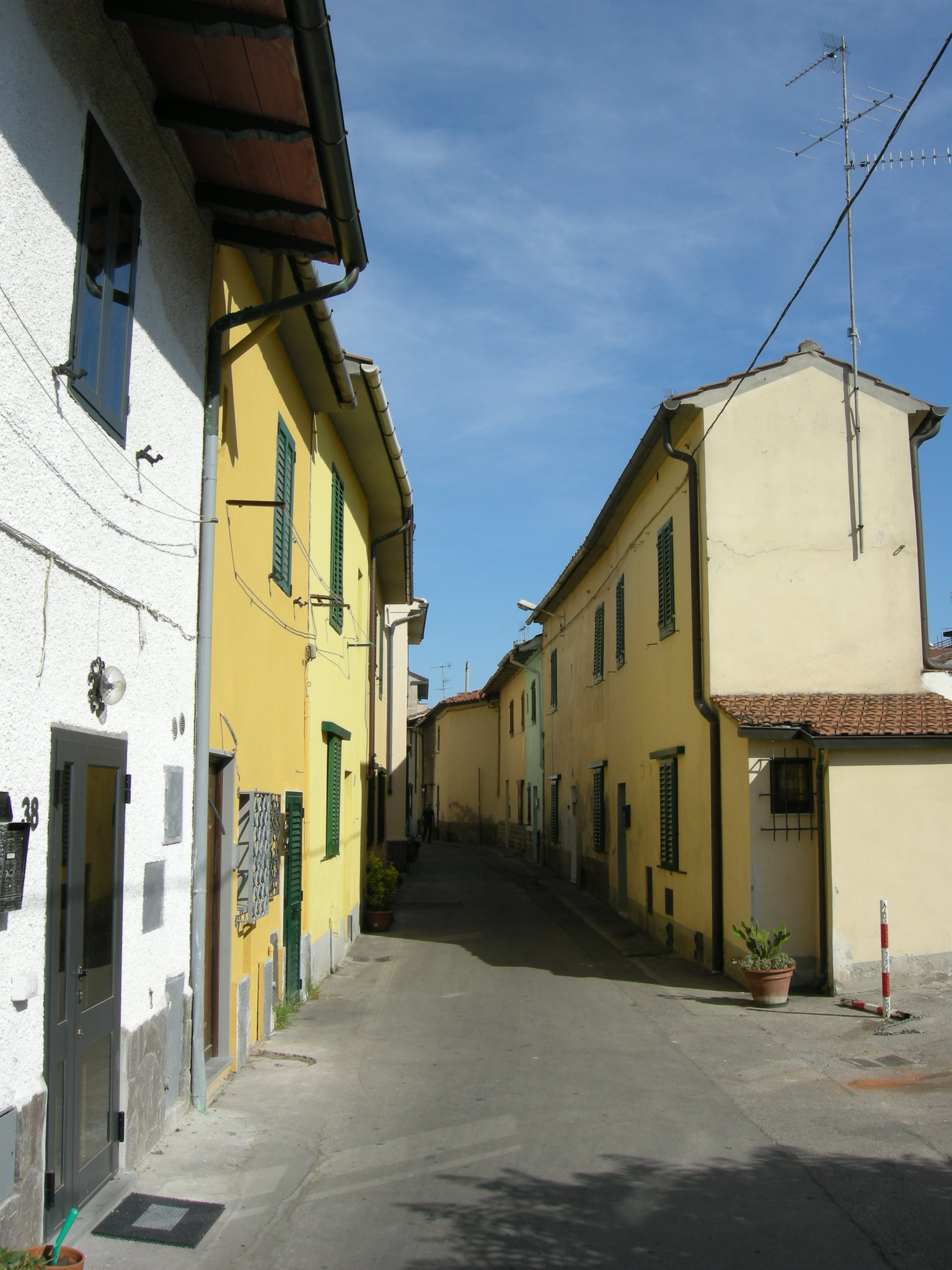 Via dei casini, prato